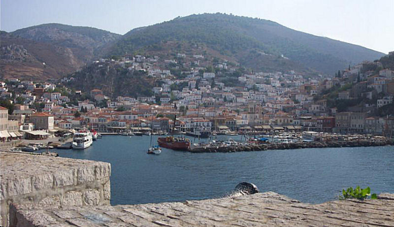 Hydra harbour